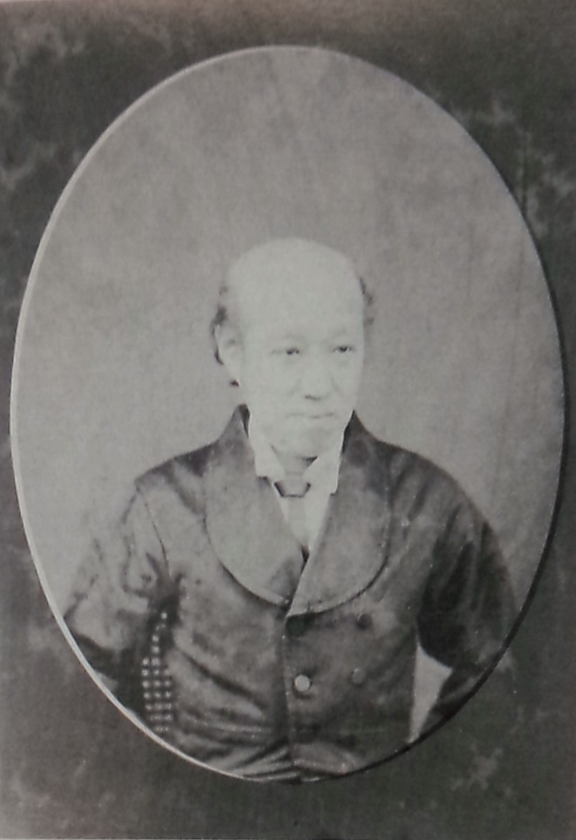 山科言縄の肖像写真。